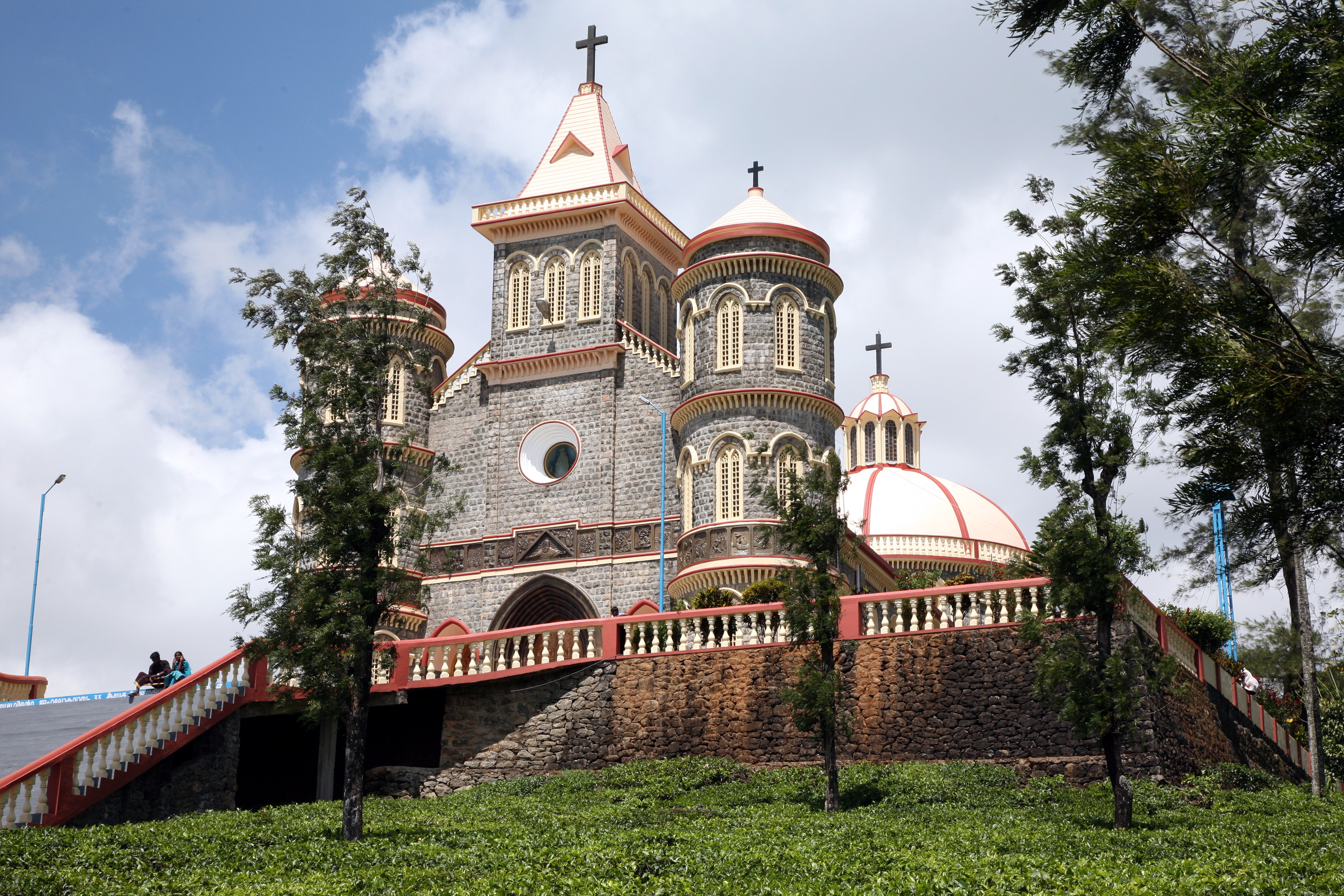 Velamkanni Matha Church, Pattumala, Kerala